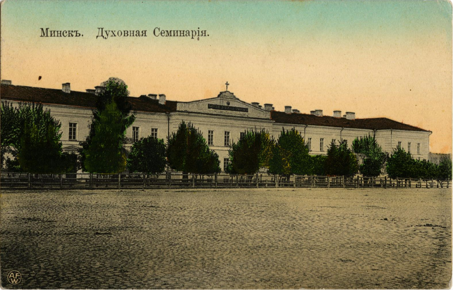 Беларуская (тарашкевіца): Менск (Miensk), Траецкая гара (Trajeckaja hara)